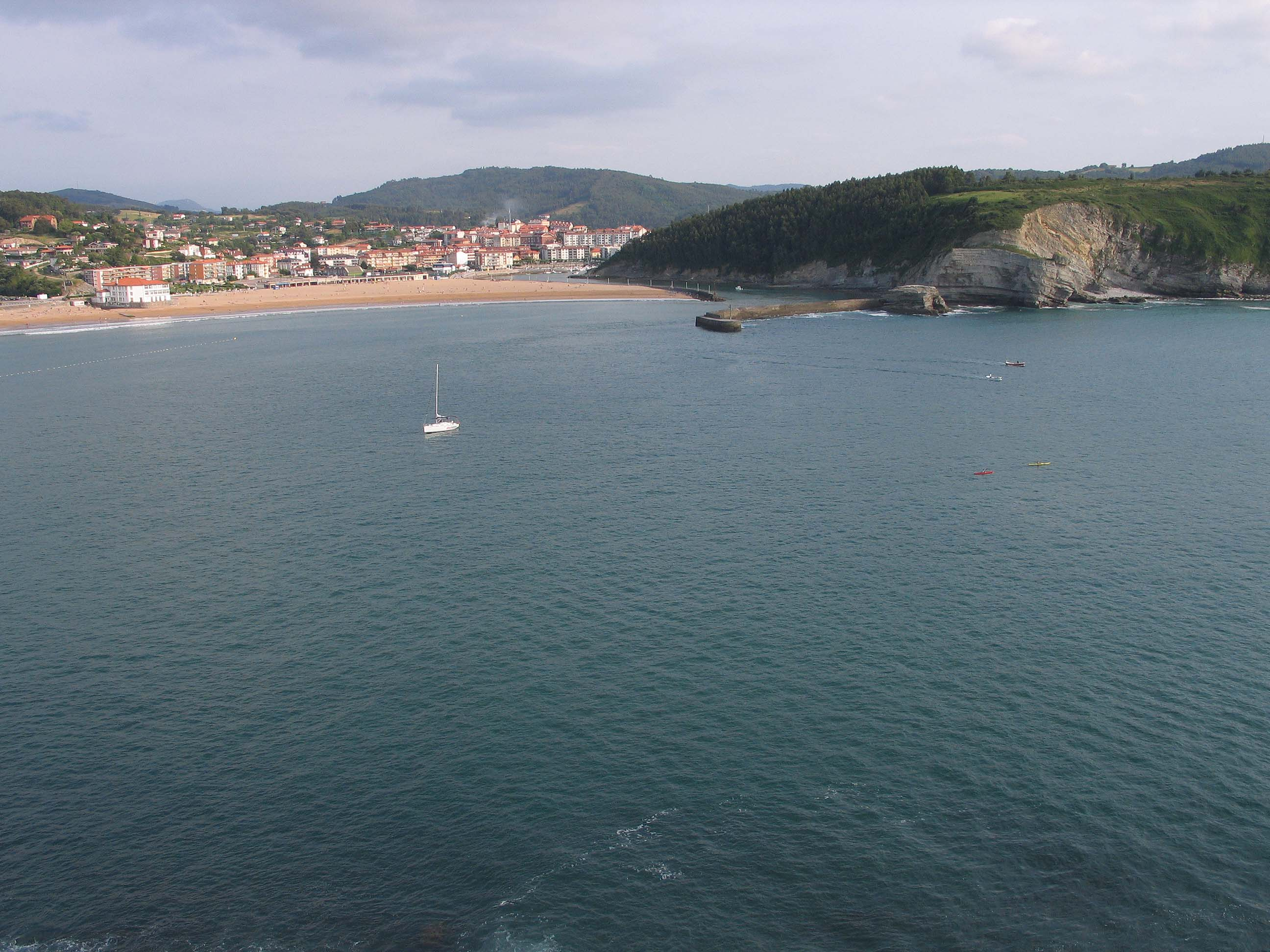 Bahia de Plencia Photograph: Luidger (23. Juni 2006)